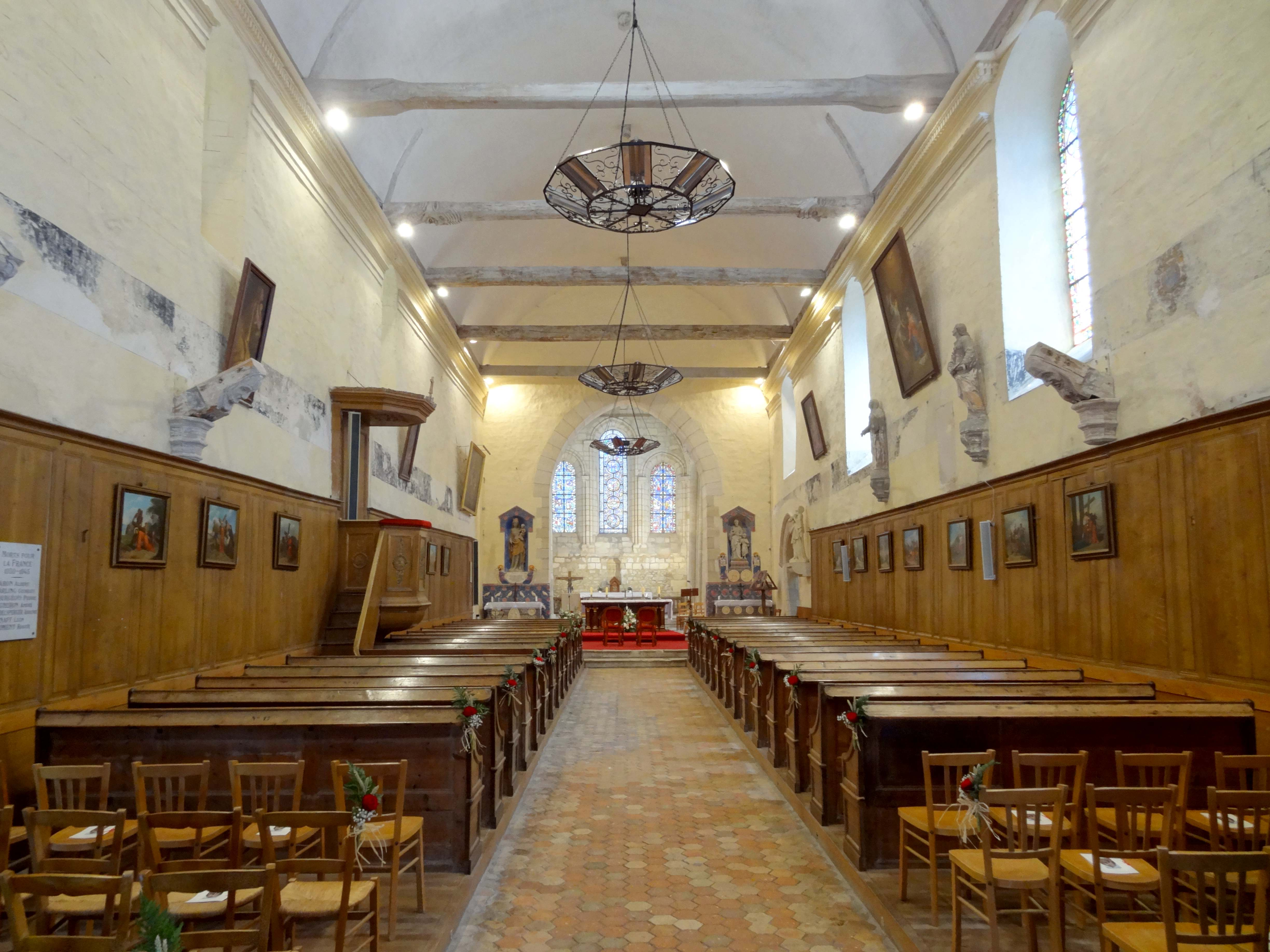 Intérieur de l'église - voir titre.